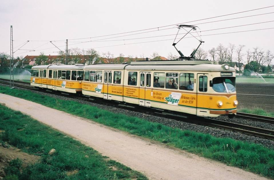 6-Achsiger Gelenktriebwagen (Et6) mit 6-Achsigem Gelenk-Beiwagen (Eb6) der Rhein-Haardtbahn (RHB). Die Rhein-Haardtbahn ist die einzige Bahngesellschaft, die Gelenk-Beiwagen eingesetzt hat. Fotografiert im April 2004 zwischen Ruchheim und Maxdorf. Die Fahrzeuge wurden 1963 von Duewag gebaut.